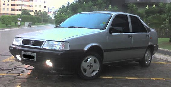 Fiat Tempra i.e. 8v 1994/1995 - Cinza Torino.